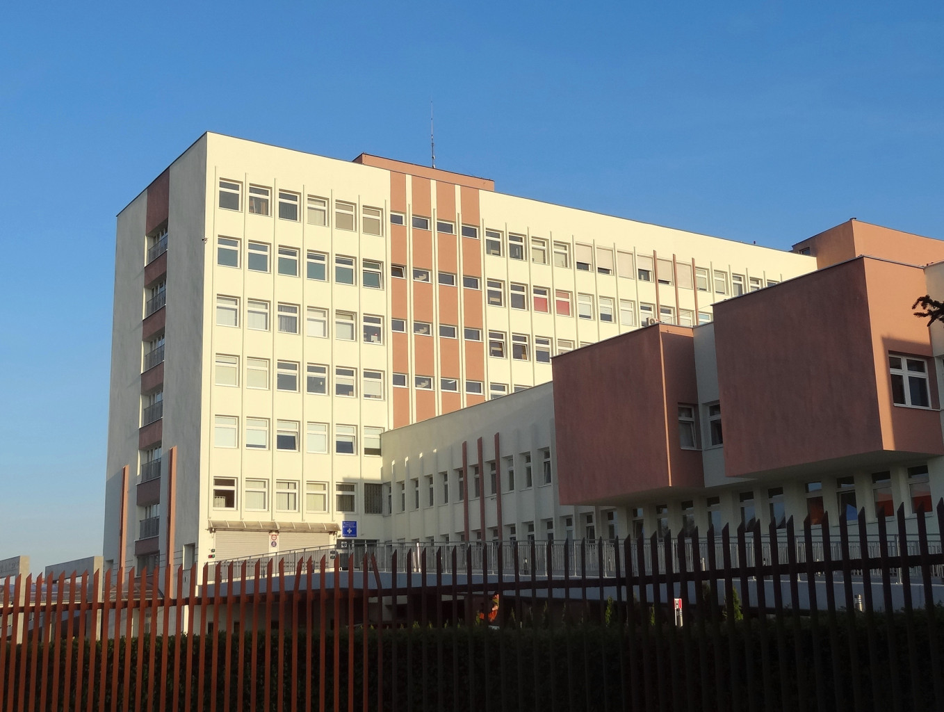 Szpital Wojskowy w Bydgoszczy przy ul. Powstańców Warszawy